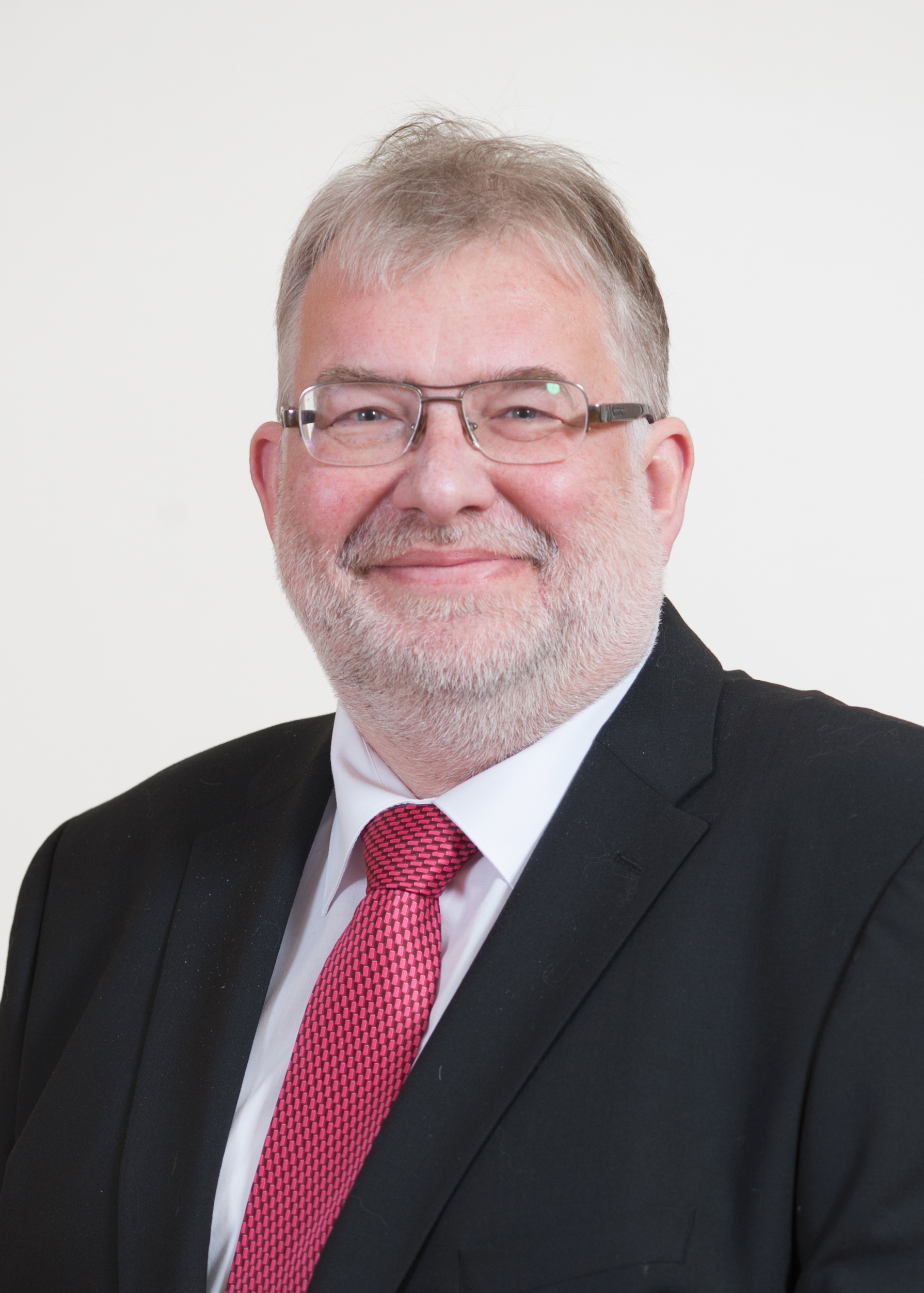 Andres Ammas